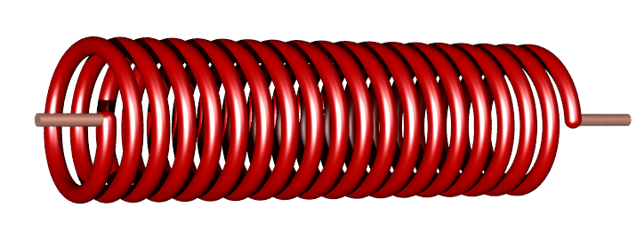 Solenoid utan kärna